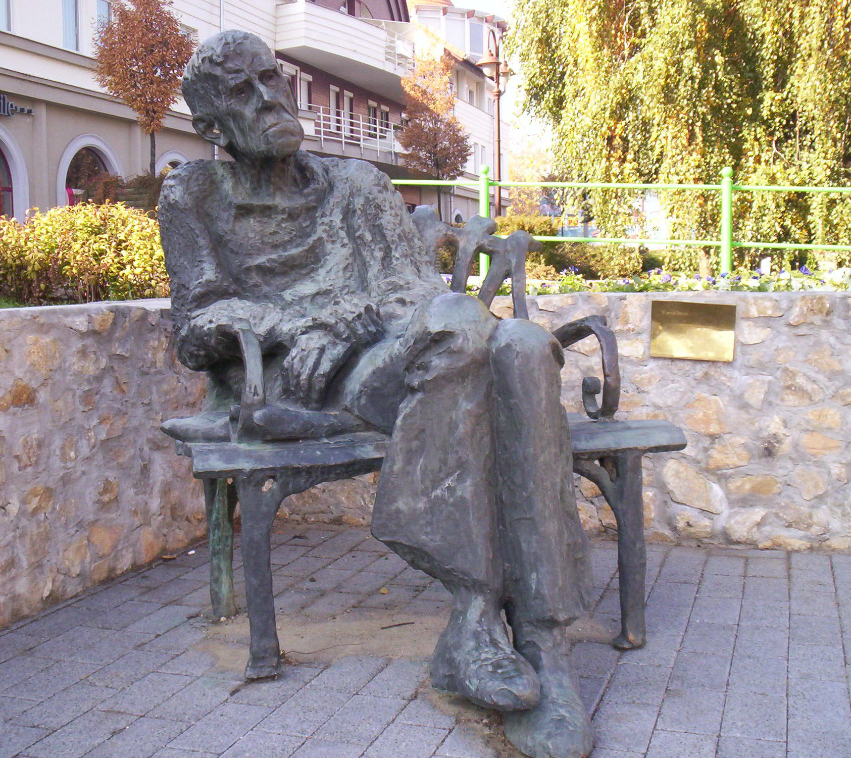 Czóbel Béla szobra Siófokon (Varga Imre alkotása) – photo taken by the uploader 2005